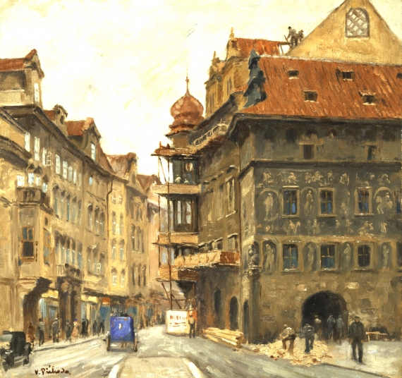 Václav Příhoda - Stará Praha, dům U Minuty